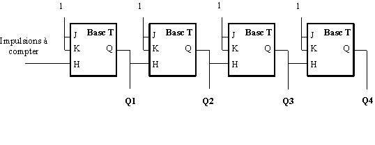 Schéma d'un compteur binaire asynchrone